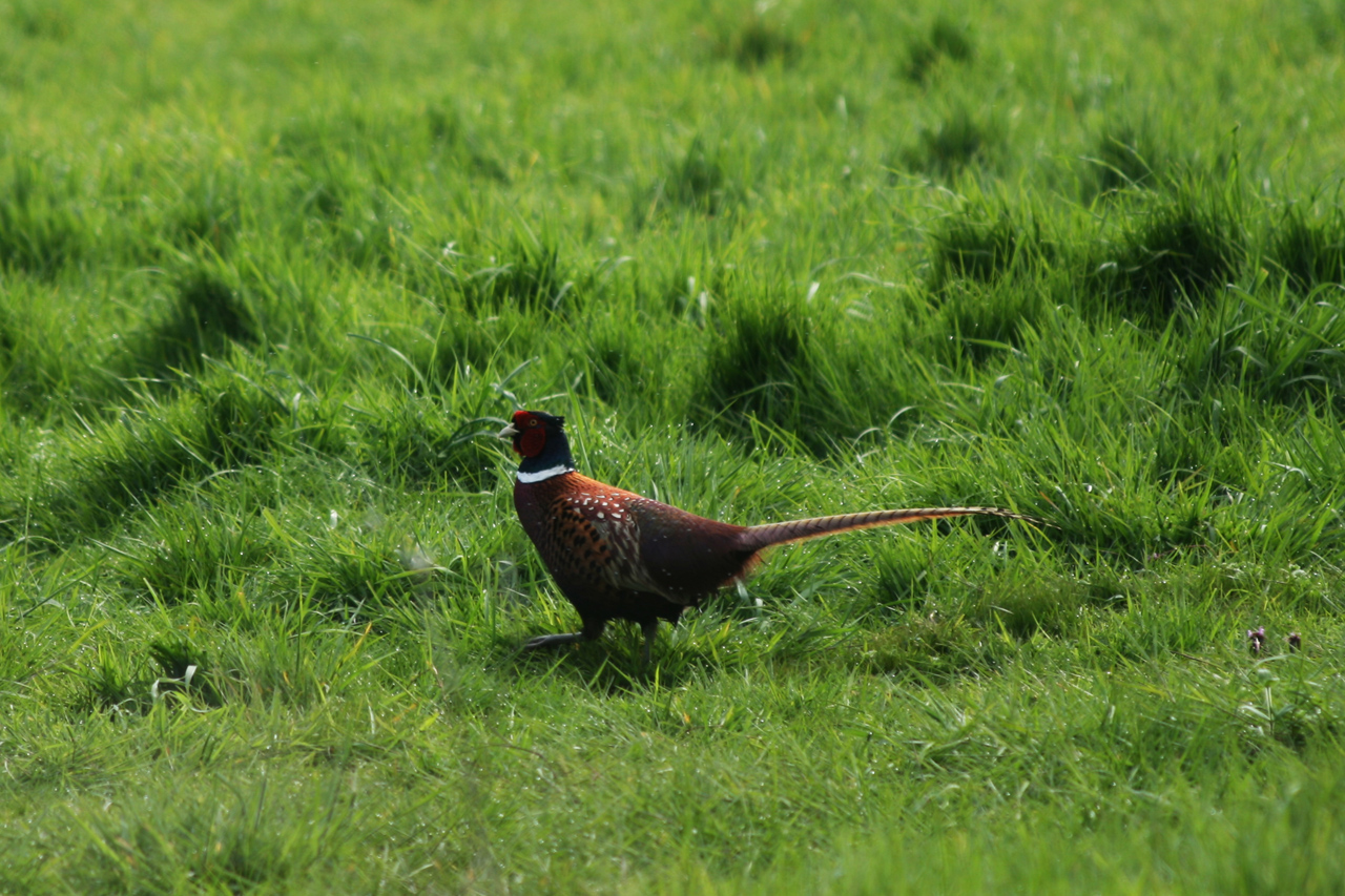 Faisan